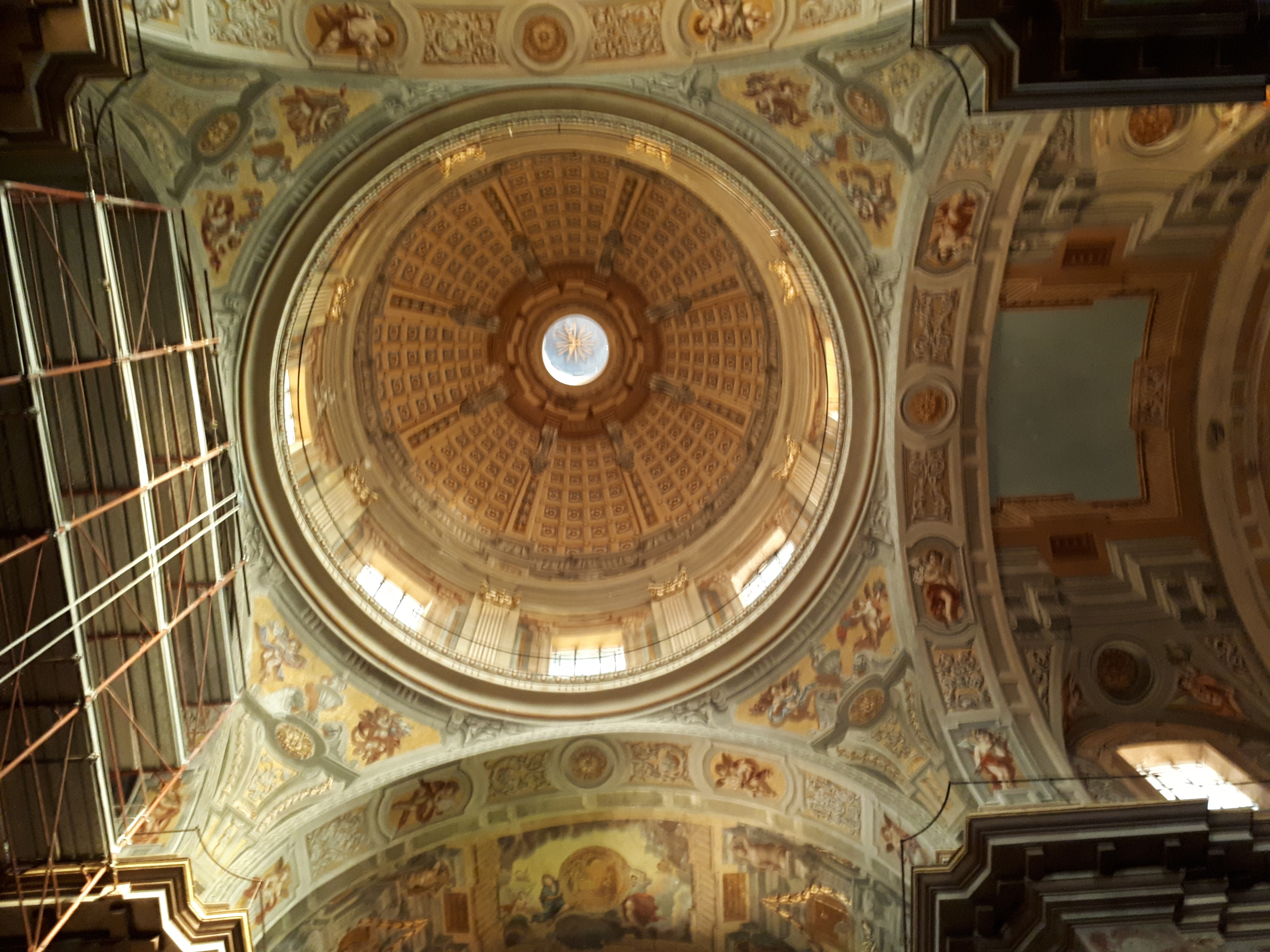 Cupola della Chiesa di San Francesco di Chieti, vista dall'interno durante i restauri dopo il terremoto del 2009